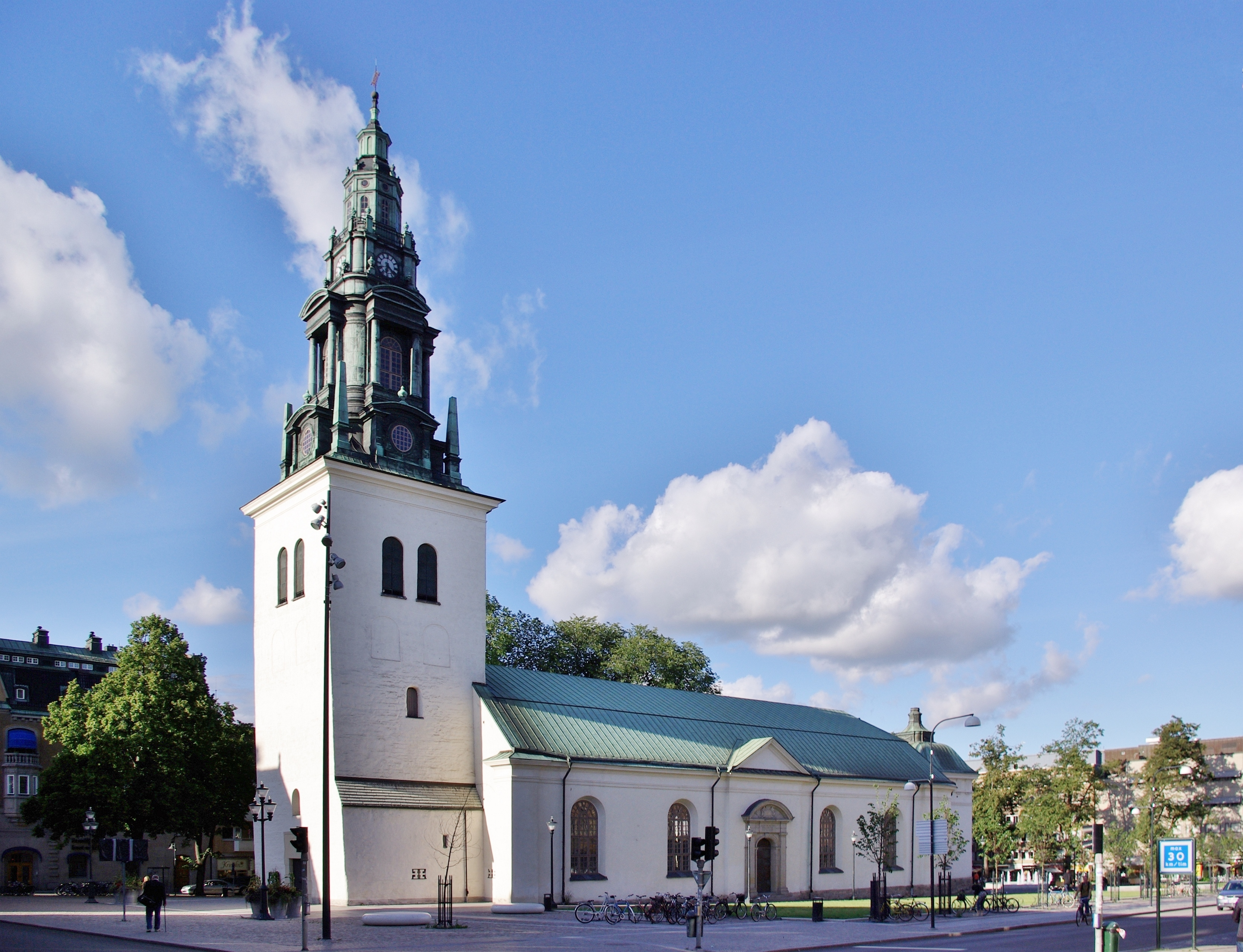 Linköping in Schweden. Die St. Lars Kirche in Linköping.